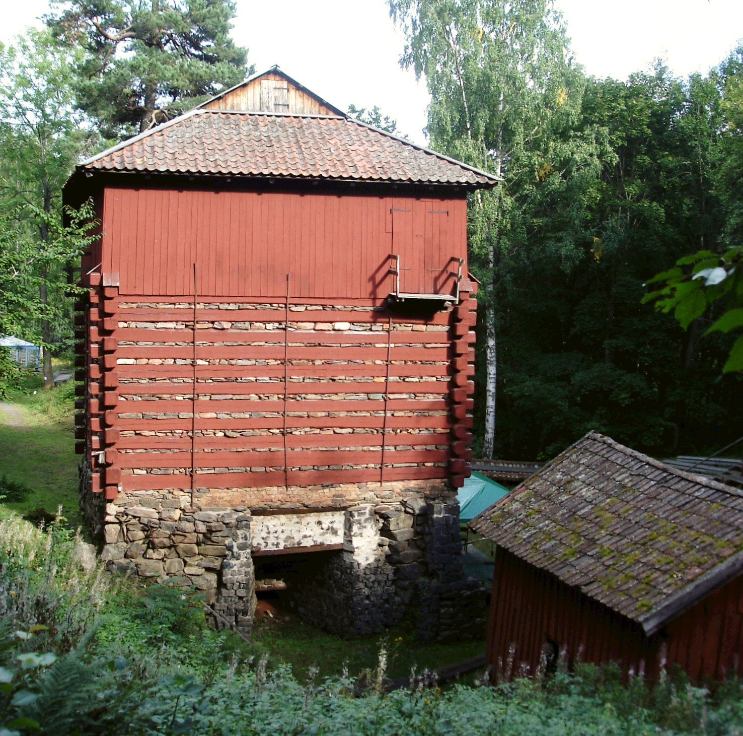 Sett från V, till höger vattenhjulshuset